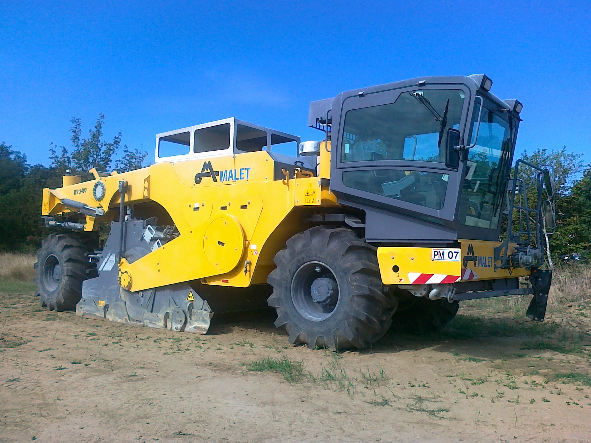 Pulvimixeur, stabilisateur de sol Wirtgen WR2400 de la société Malet filiale de Spie Batignolles (Toulouse, France)